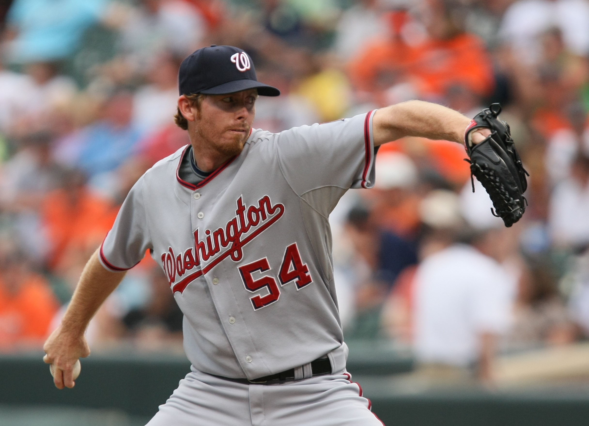 Mike MacDougal